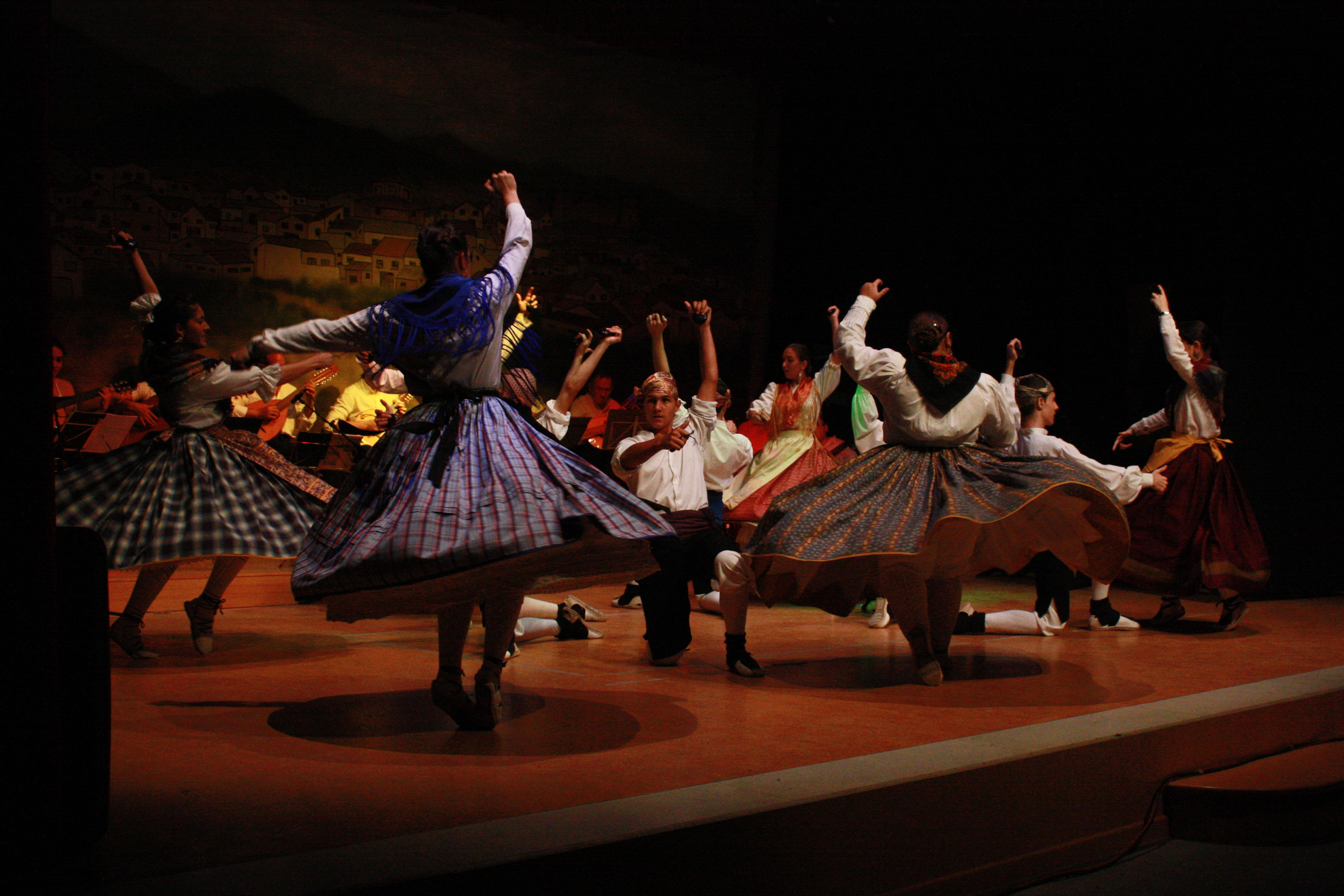 Bailando la jota